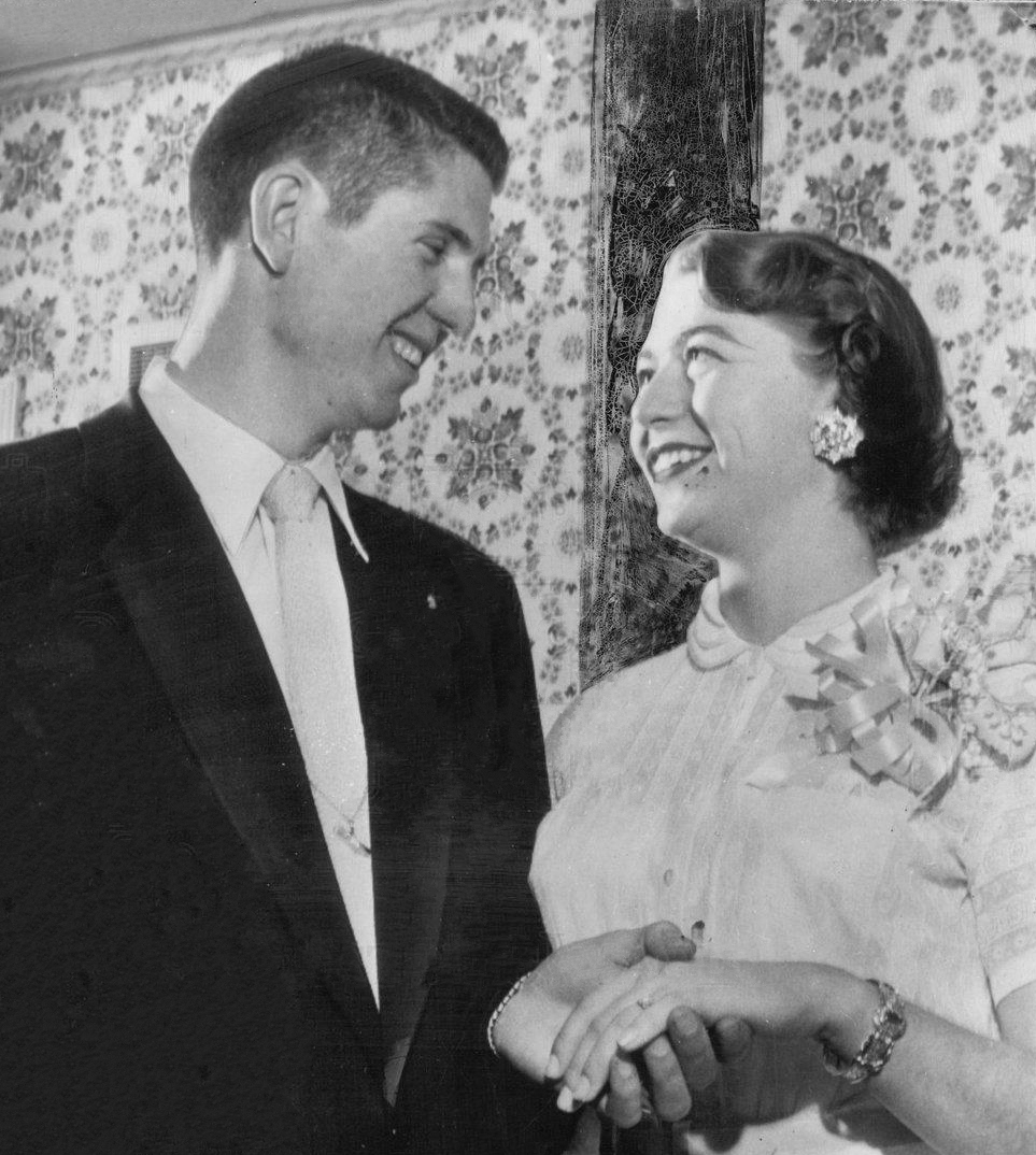 1954 Press Photo Kansas Distance Runner Wes Santee - RRQ19667